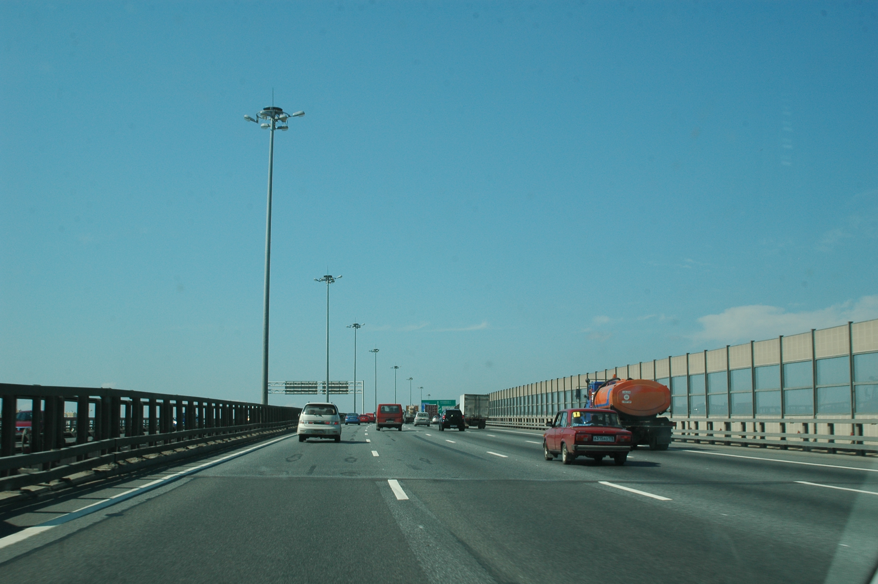 St Petersburg, Russia